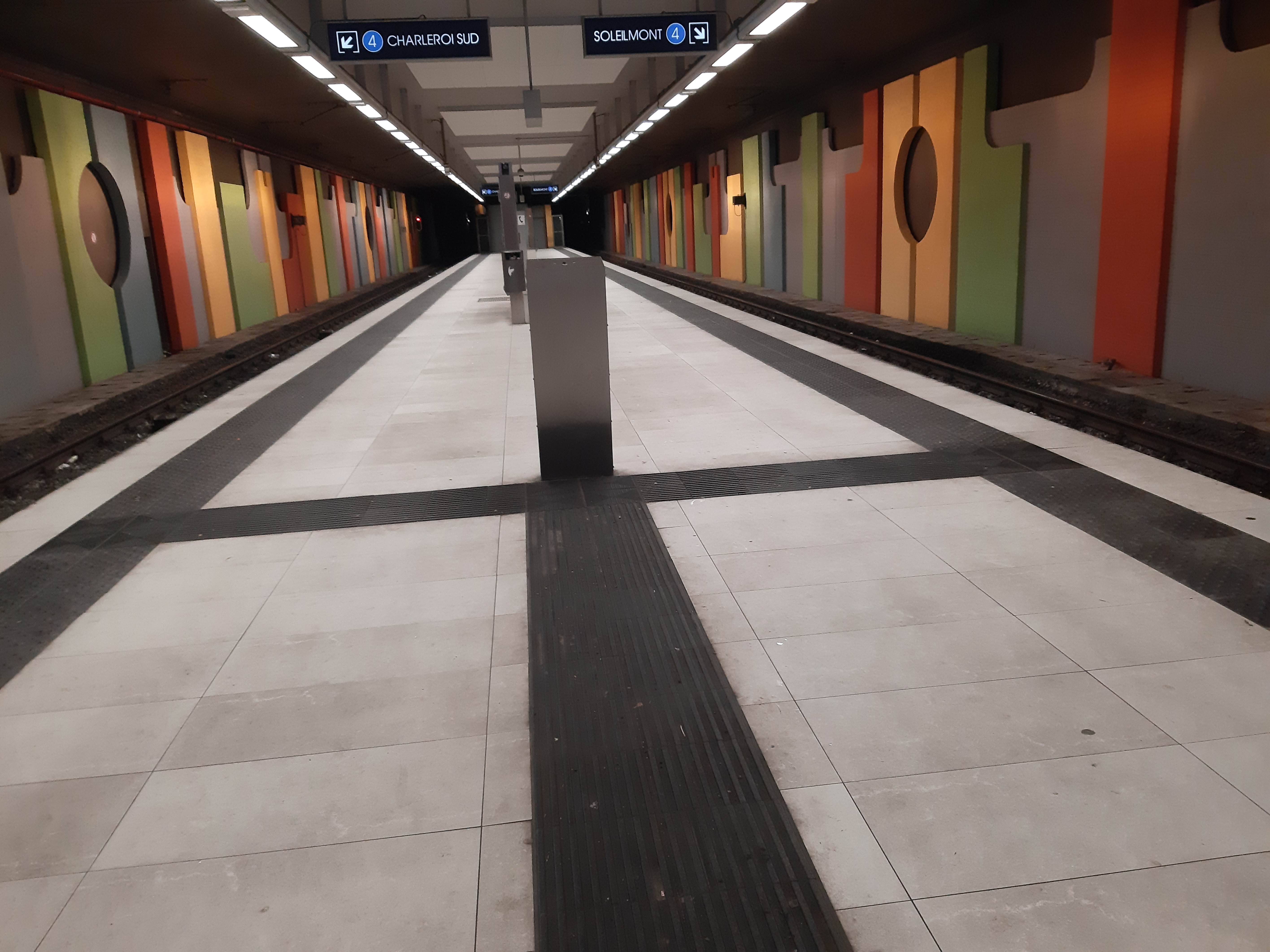 Quai de la station Gazomètre à gauche ligne M4 en direction Sud, à droite ligne M4 en direction Soleilmont